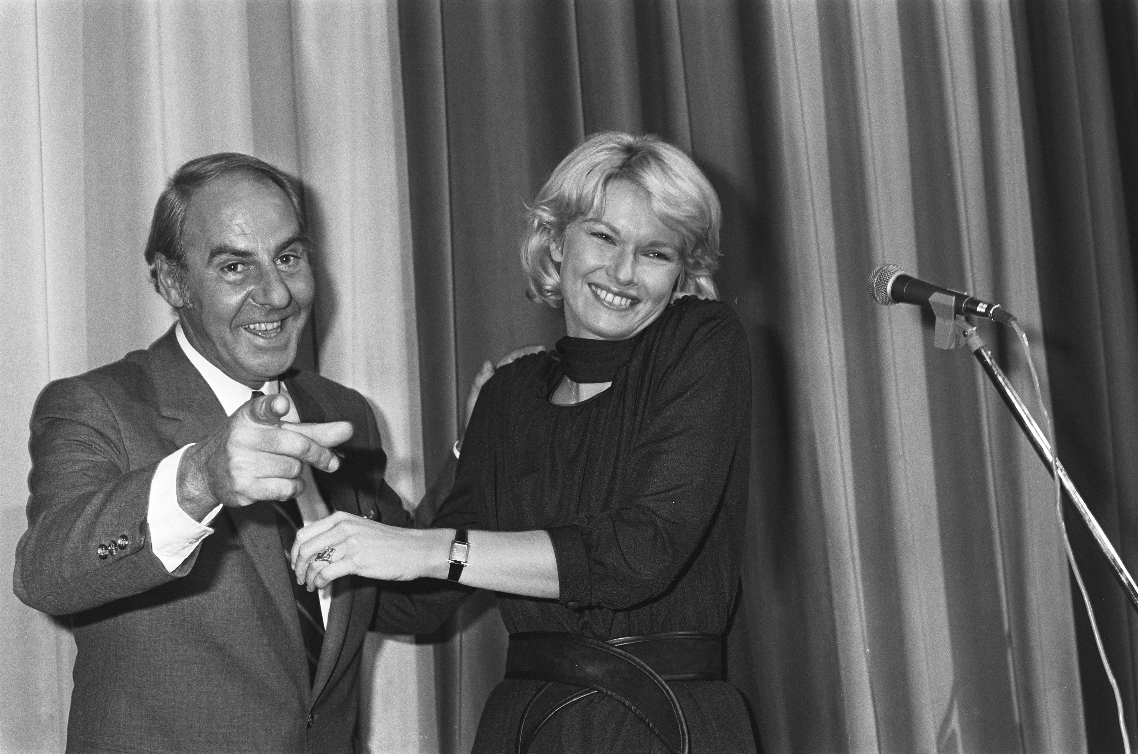 Collectie / Archief : Fotocollectie Anefo Reportage / Serie : Uitreiking van de Televisierring 1980 aan Martine Bijl in het Okurahotel door Willlem Duys Beschrijving : Willem Duys en Martine Bijl tijdens de uitreiking Datum : 19 september 1980 Locatie : Amsterdam, Noord-Holland Trefwoorden : artiesten, prijsuitreikingen, televisieprijzen Persoonsnaam : Bijl, Martine, Duys, Willem Instellingsnaam : Hotel Okura Amsterdam, Televizierring Fotograaf : Antonisse, Marcel / Anefo Auteursrechthebbende : Nationaal Archief Materiaalsoort : Negatief (zwart/wit) Nummer archiefinventaris : bekijk toegang 2.24.01.05 Bestanddeelnummer : 931-0293